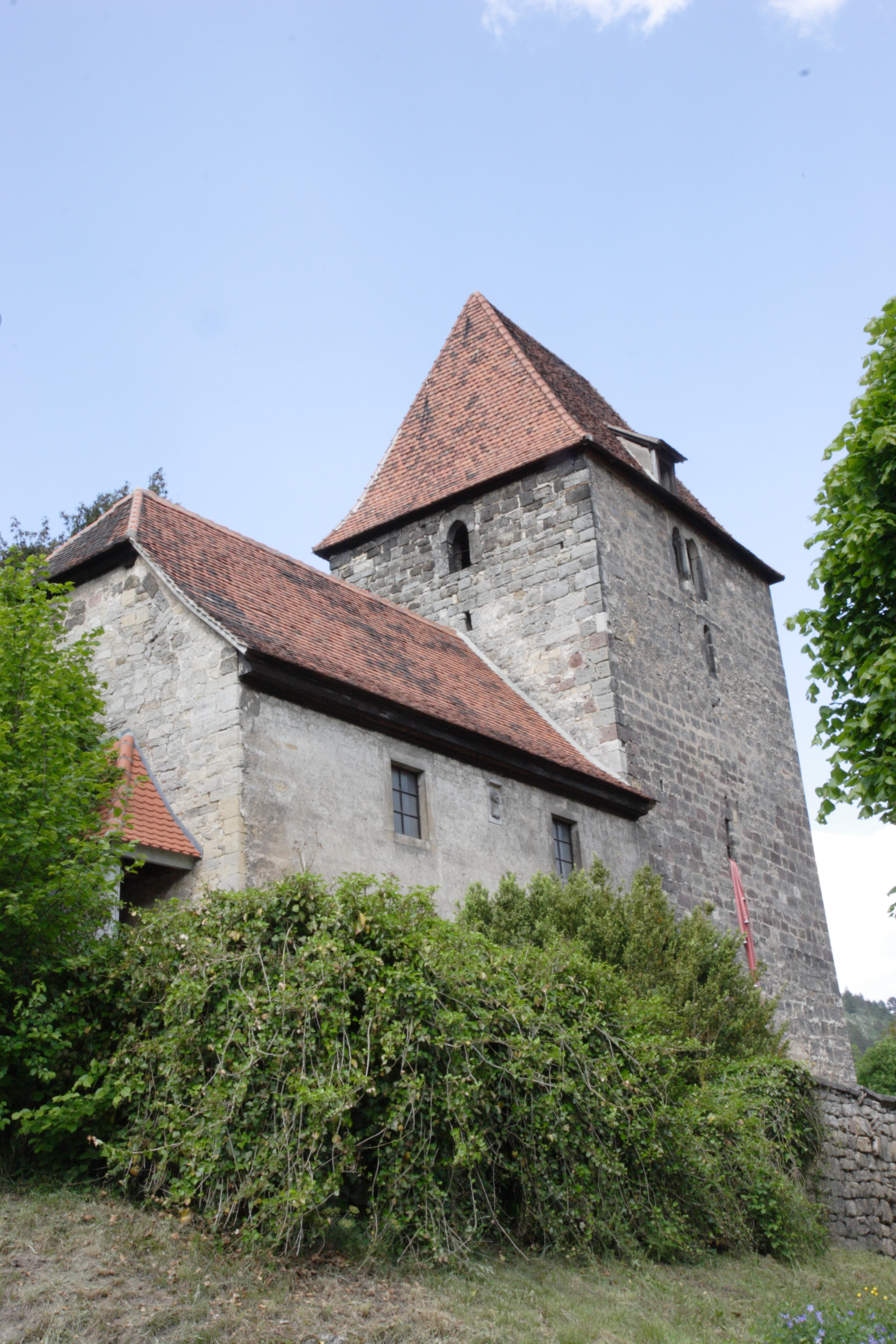 Wehrkirche St. Nikolaus in Leutra (Jena); Vorderseite